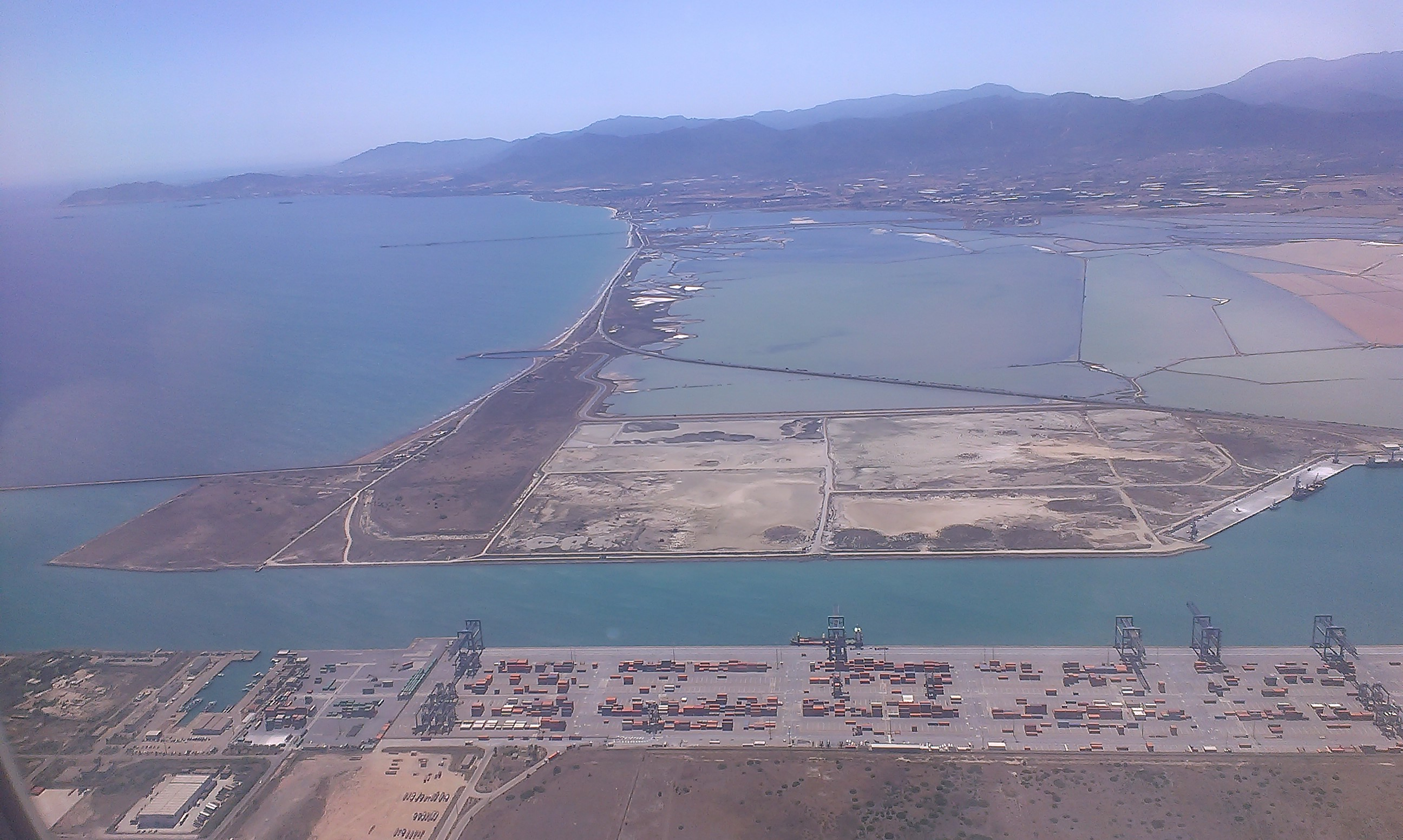 Porto Canale di Cagliari